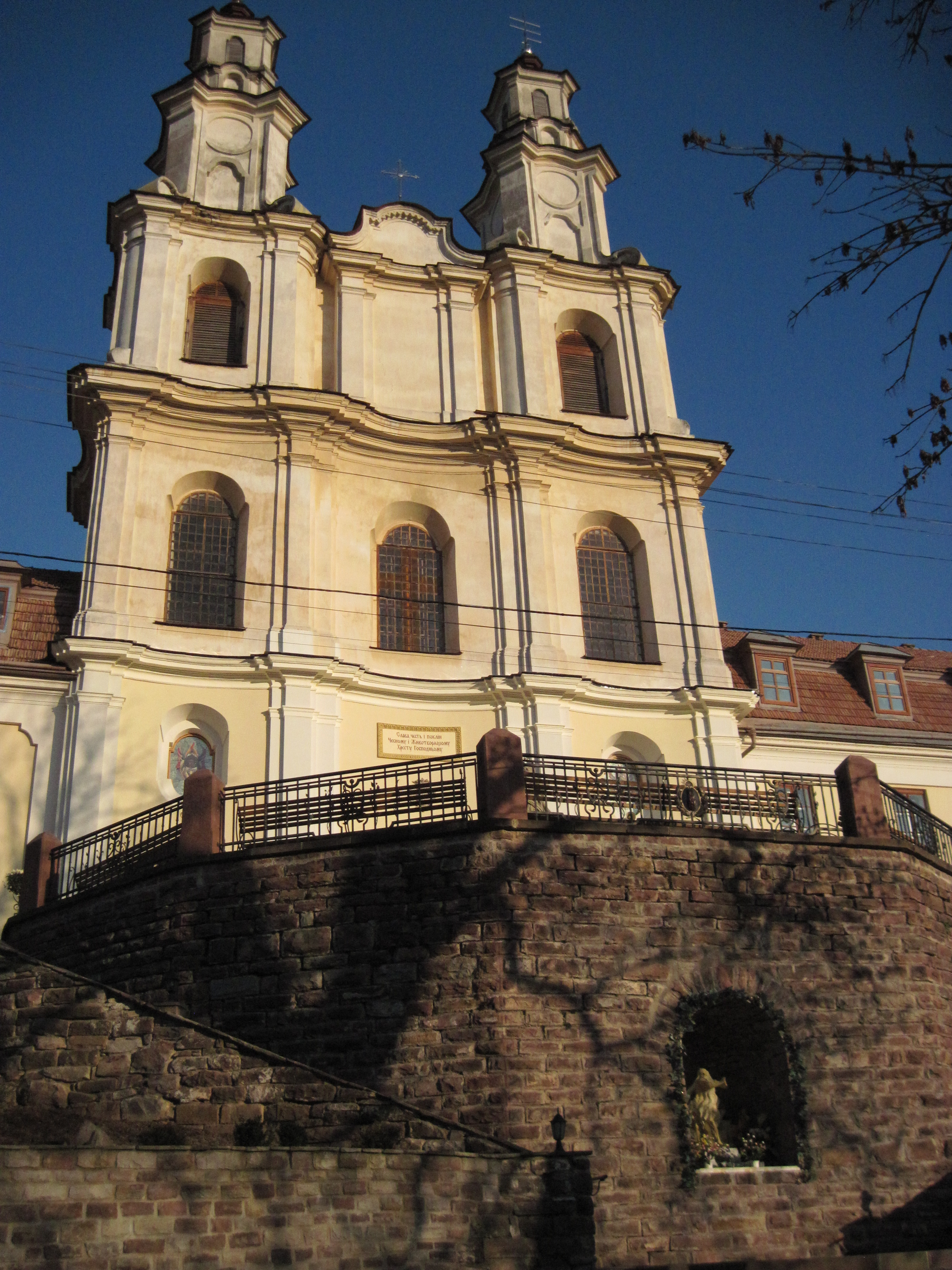 Монастир васліян. Фасад церкви. Бучач, осінь 2013